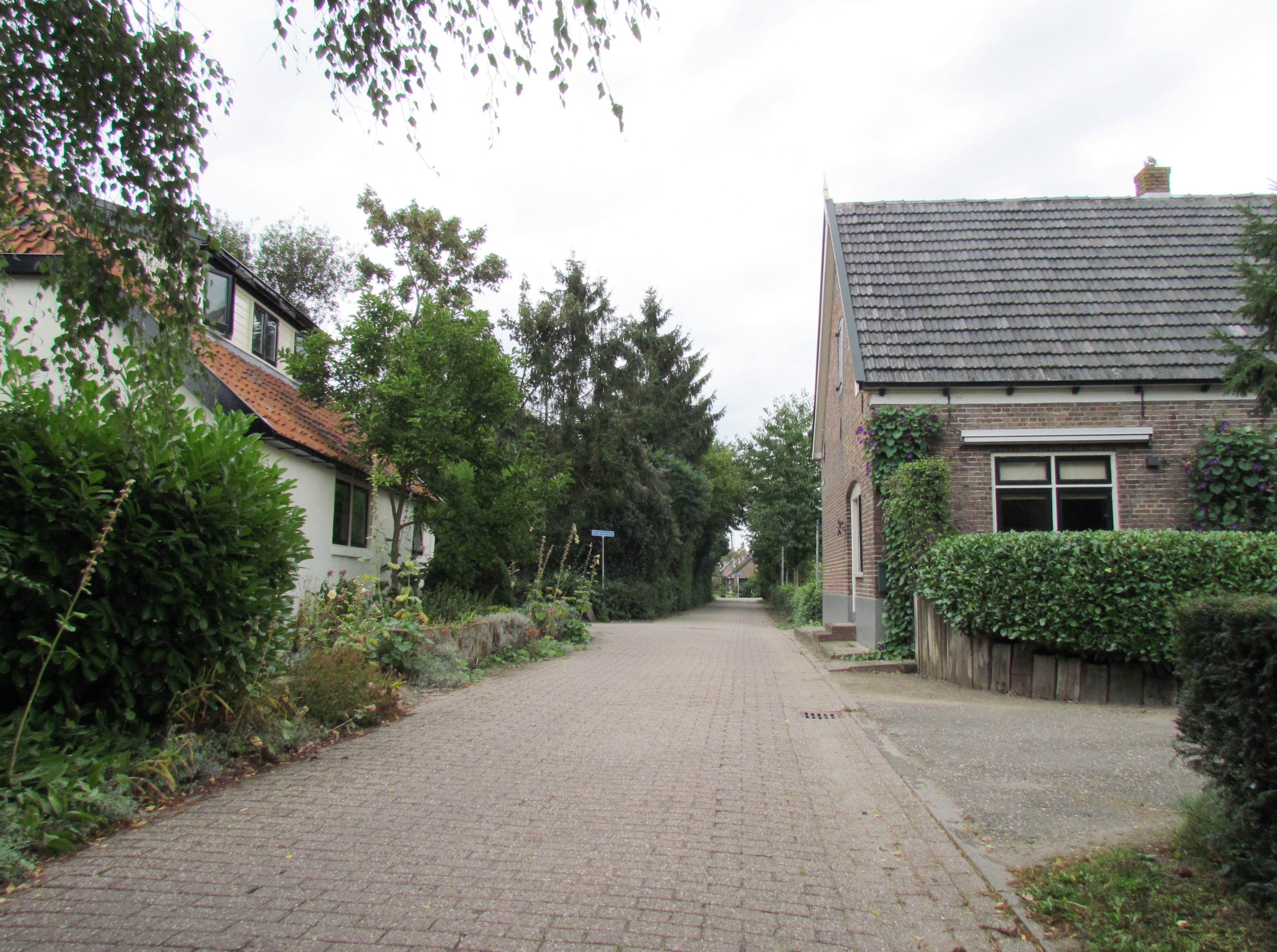 Ennestraat in Steenenkamer (gemeente Voorst, NL)